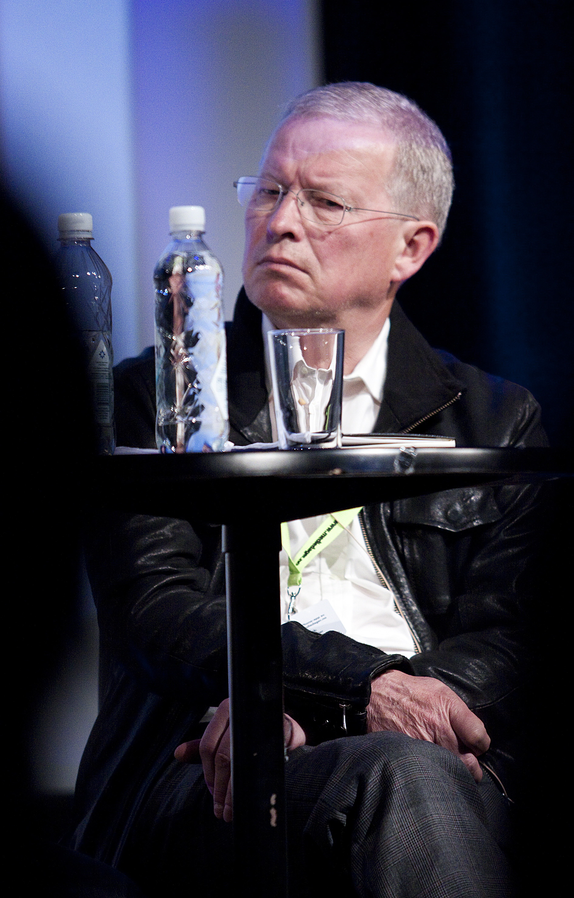 Bernt Olufsen på sesjonen Mindre penger - bedre journalistikk. Foto: Hildegunn Holtet. Mediedagene 2010.